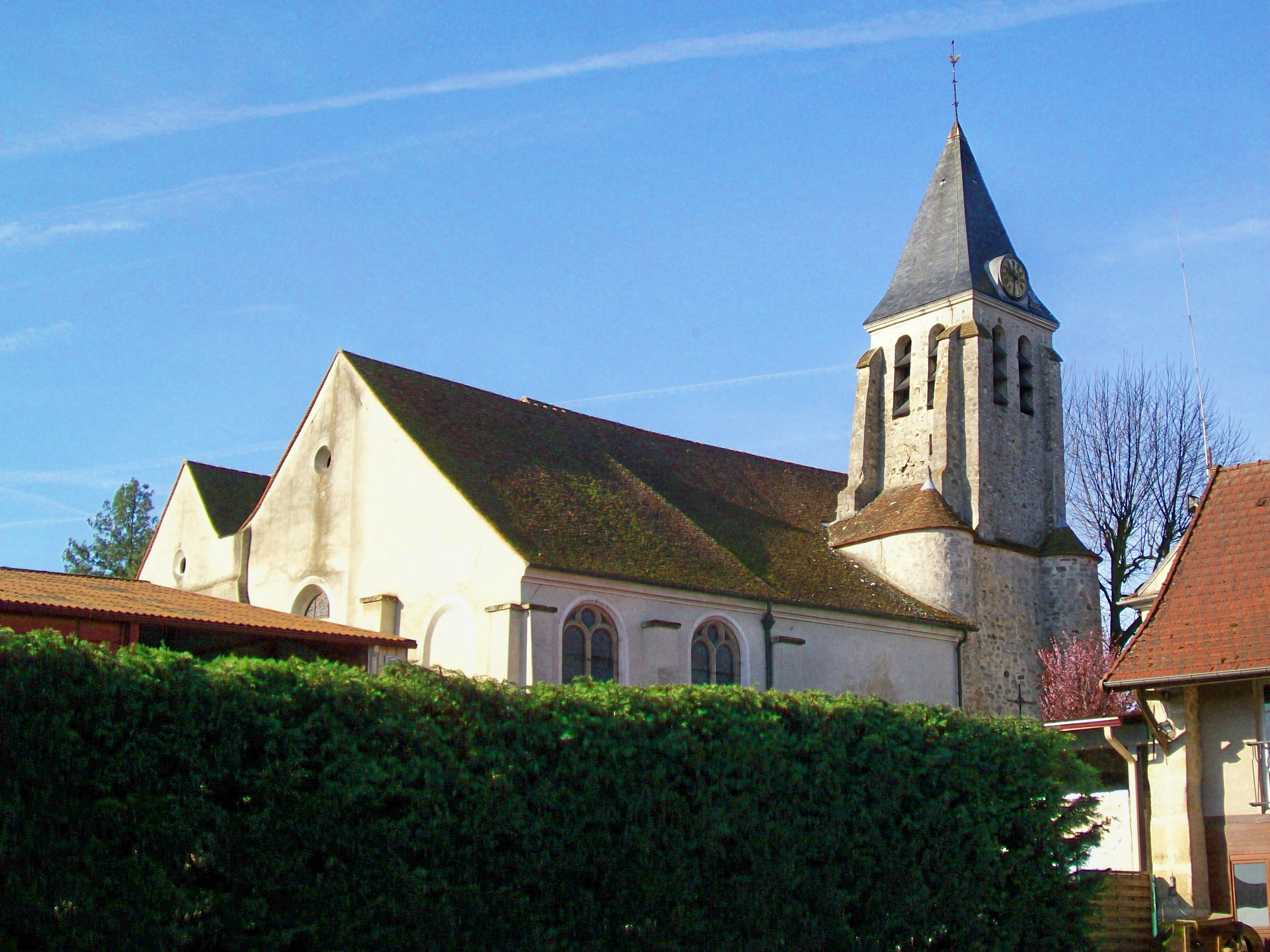 L'église Sainte-Geneviève au village, vue depuis la cour de la Ferme de l'église.